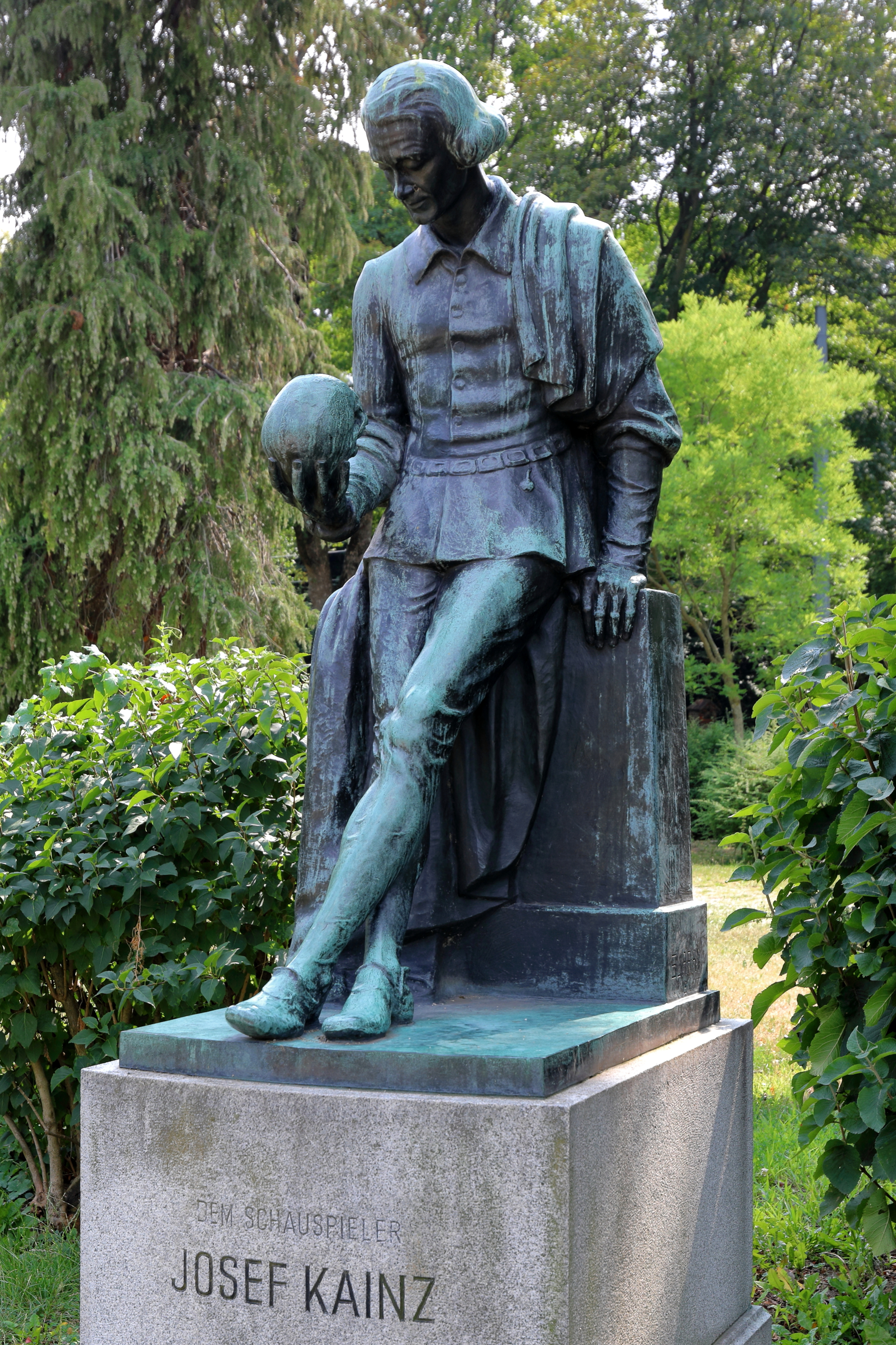 Das Josef-Kainz-Denkmal im Joseph-Kainz-Park im 18. Wiener Gemeindebezirk Währing.Das Denkmal zu Ehren des Schauspielers Josef Kainz wurde nach einem Entwurf von Sandor Jaray angefertigt, von Alois Josef Selzer in X. Wien gegossen und am 12. November 1911 enthüllt. Es stellt Kainz auf einem Granitsockel in der Rolle des Hamlets dar.